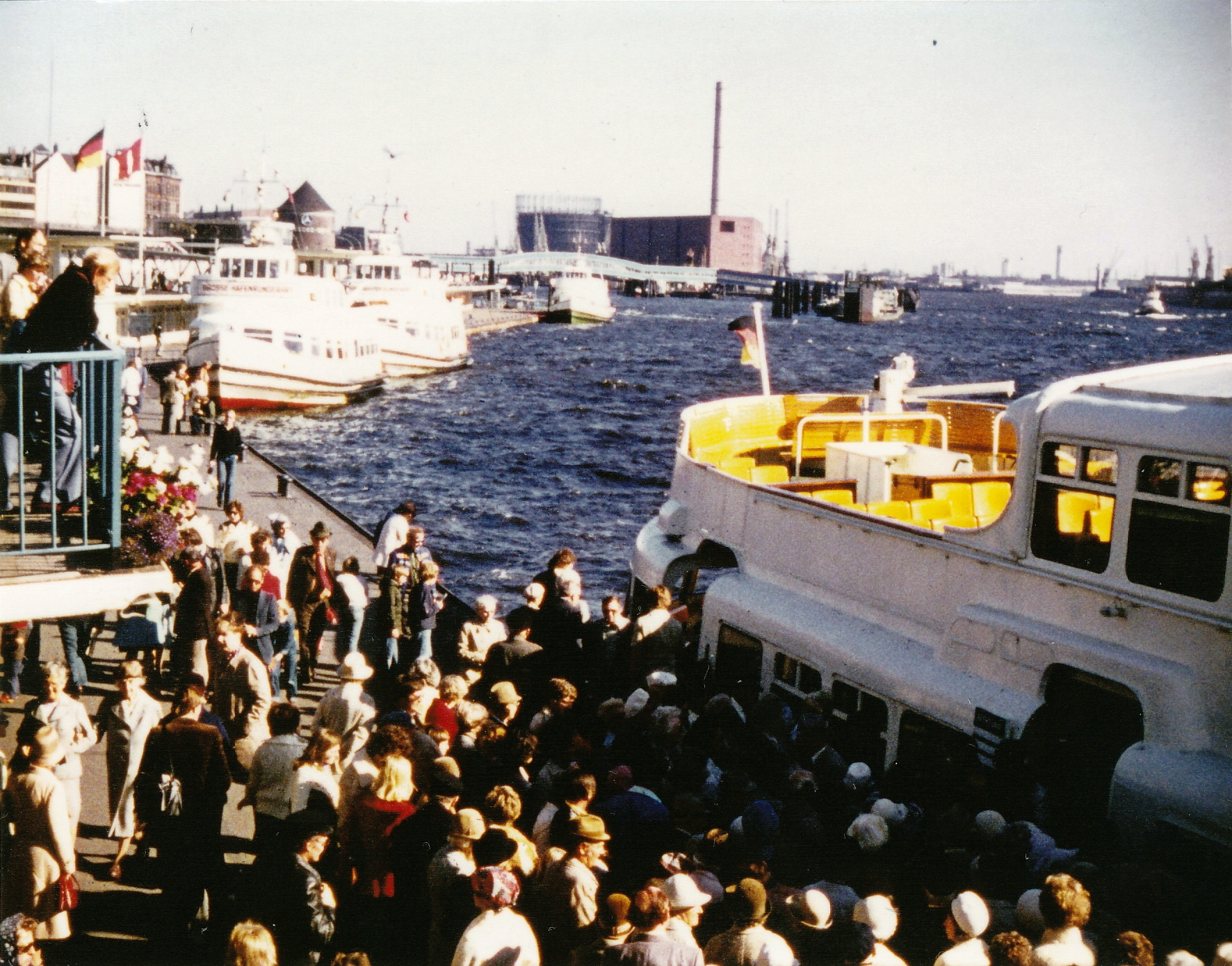 Hamburg, St. Pauli Landungsbrücken 1977. HADAG-Schiffsanleger mit Typschiffen, im Vordergrund Schiff der Finkenwerder-Linie.